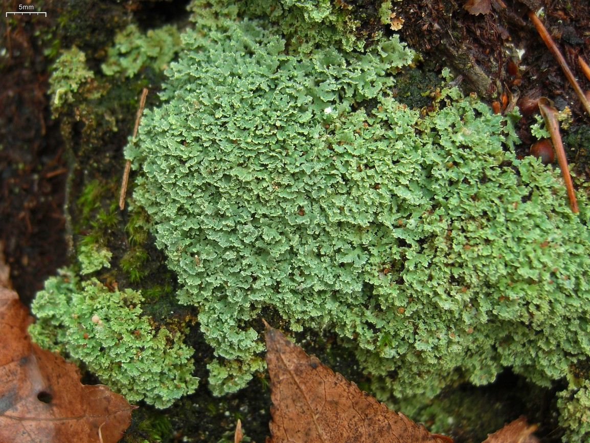 Cladonia caespiticia 20091119.80 US, NC, Smoky Mountains